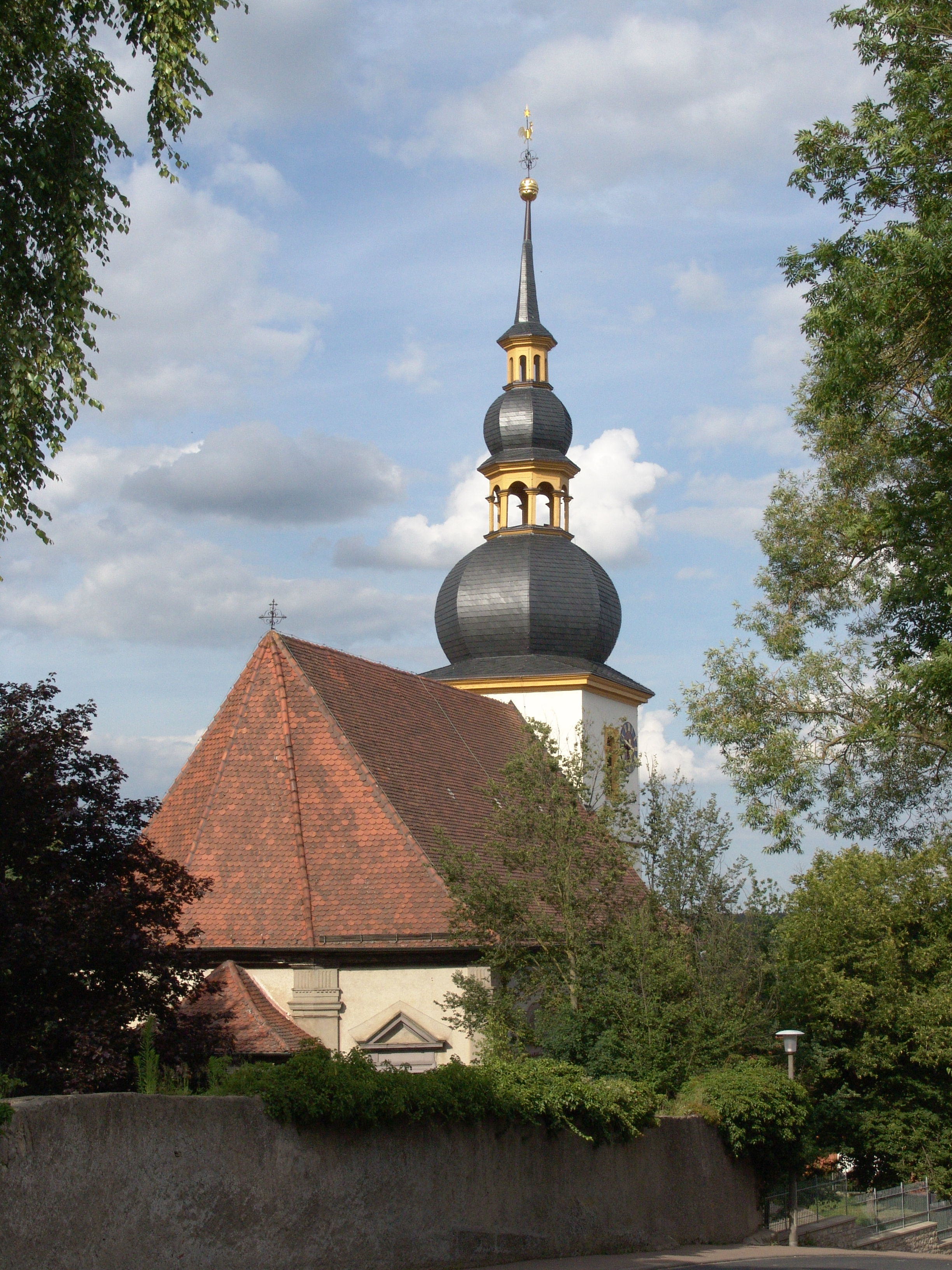 Mainstockheim St. Jakob